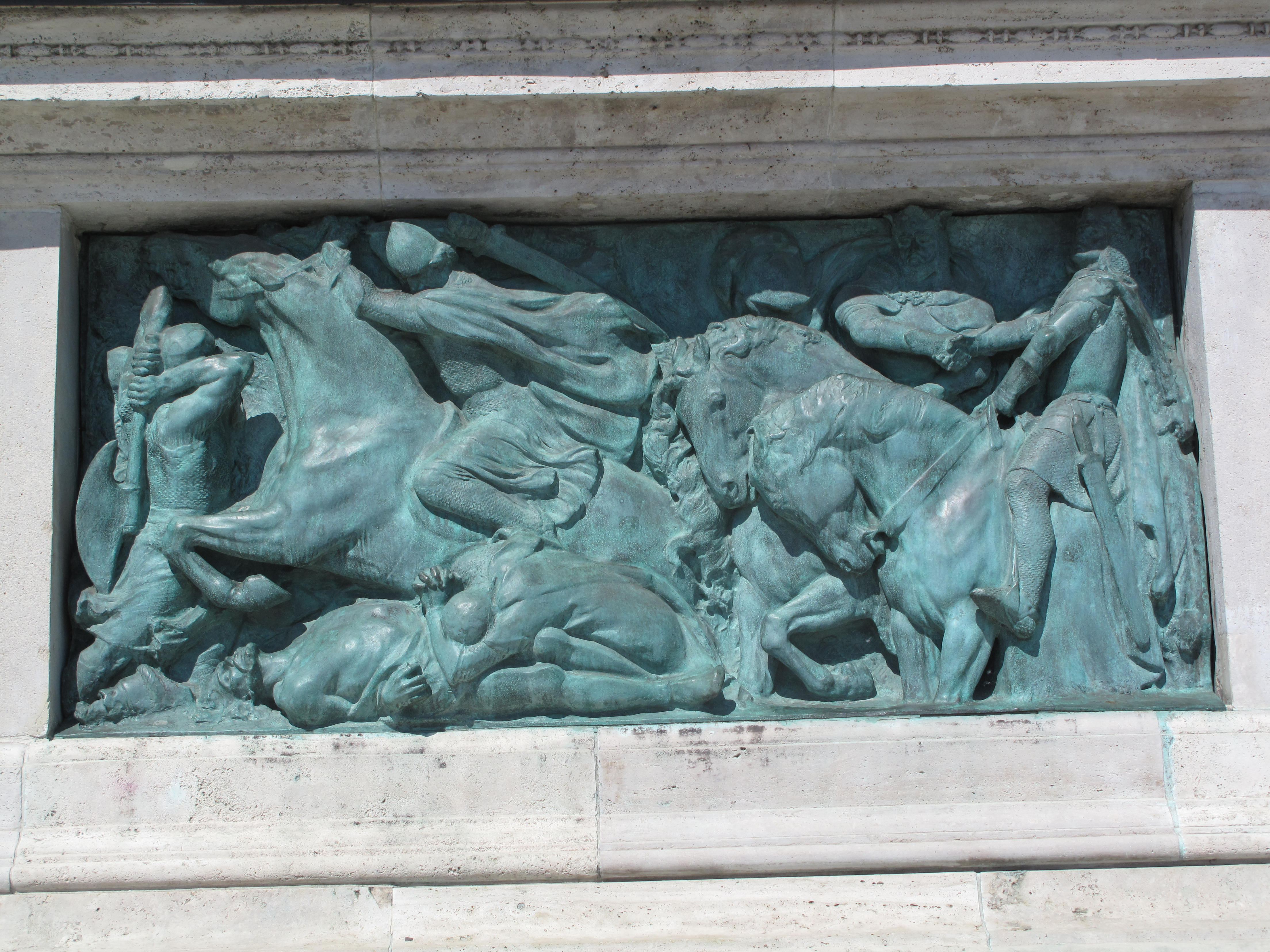 Náměstí Hrdinů, Budapešť